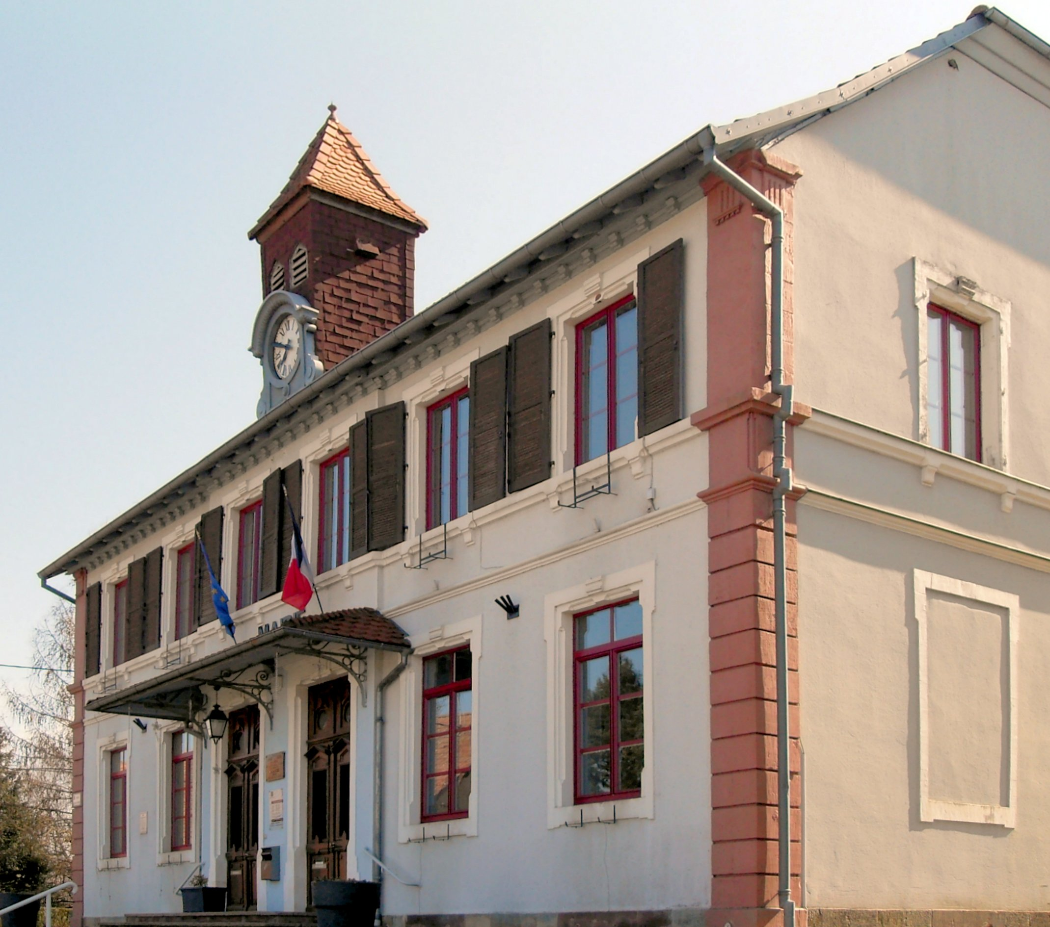 La mairie de Montreux-Château